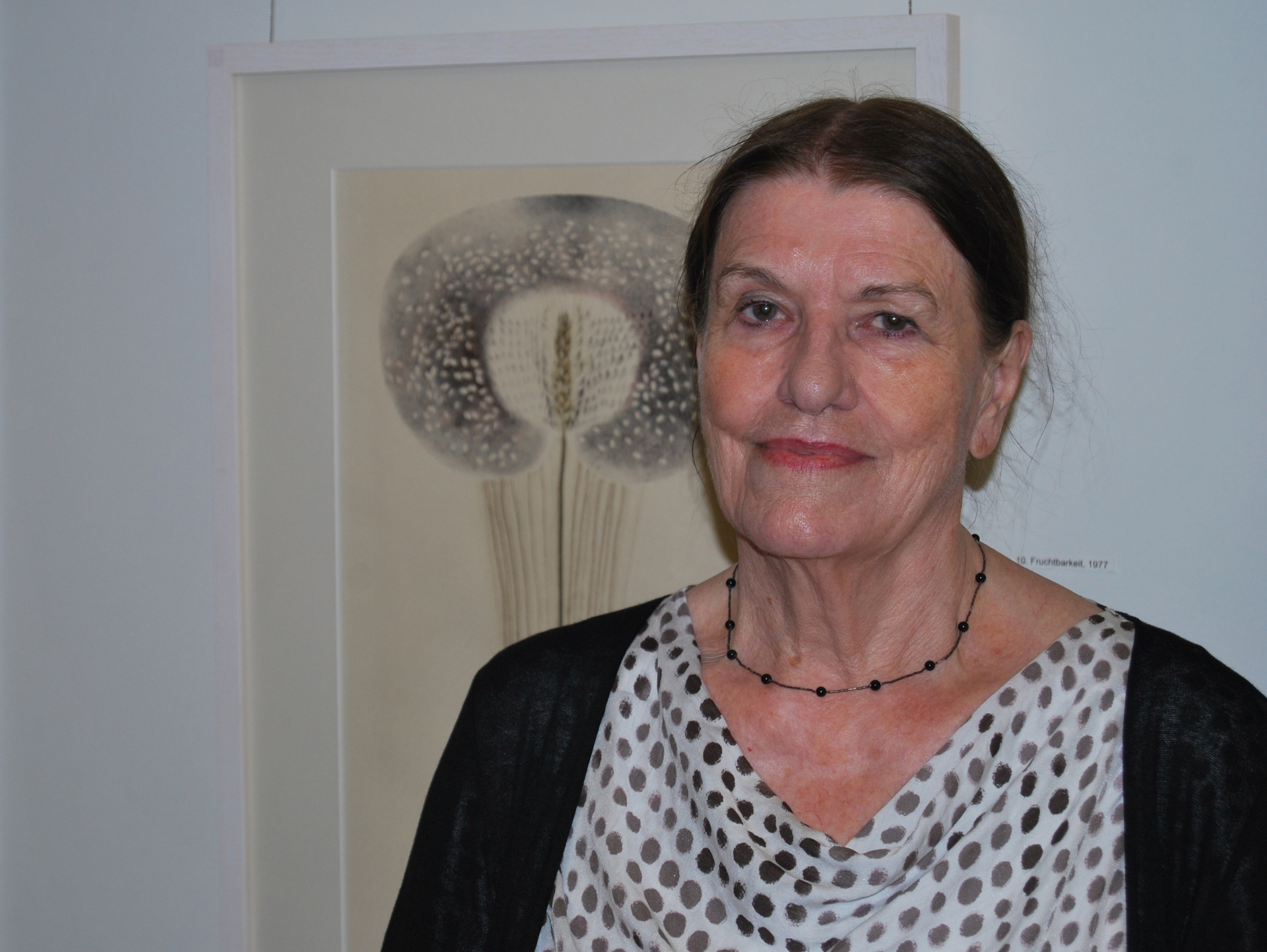 Porträtfoto der bildenden Künstlerin Sieglinde Bottesch